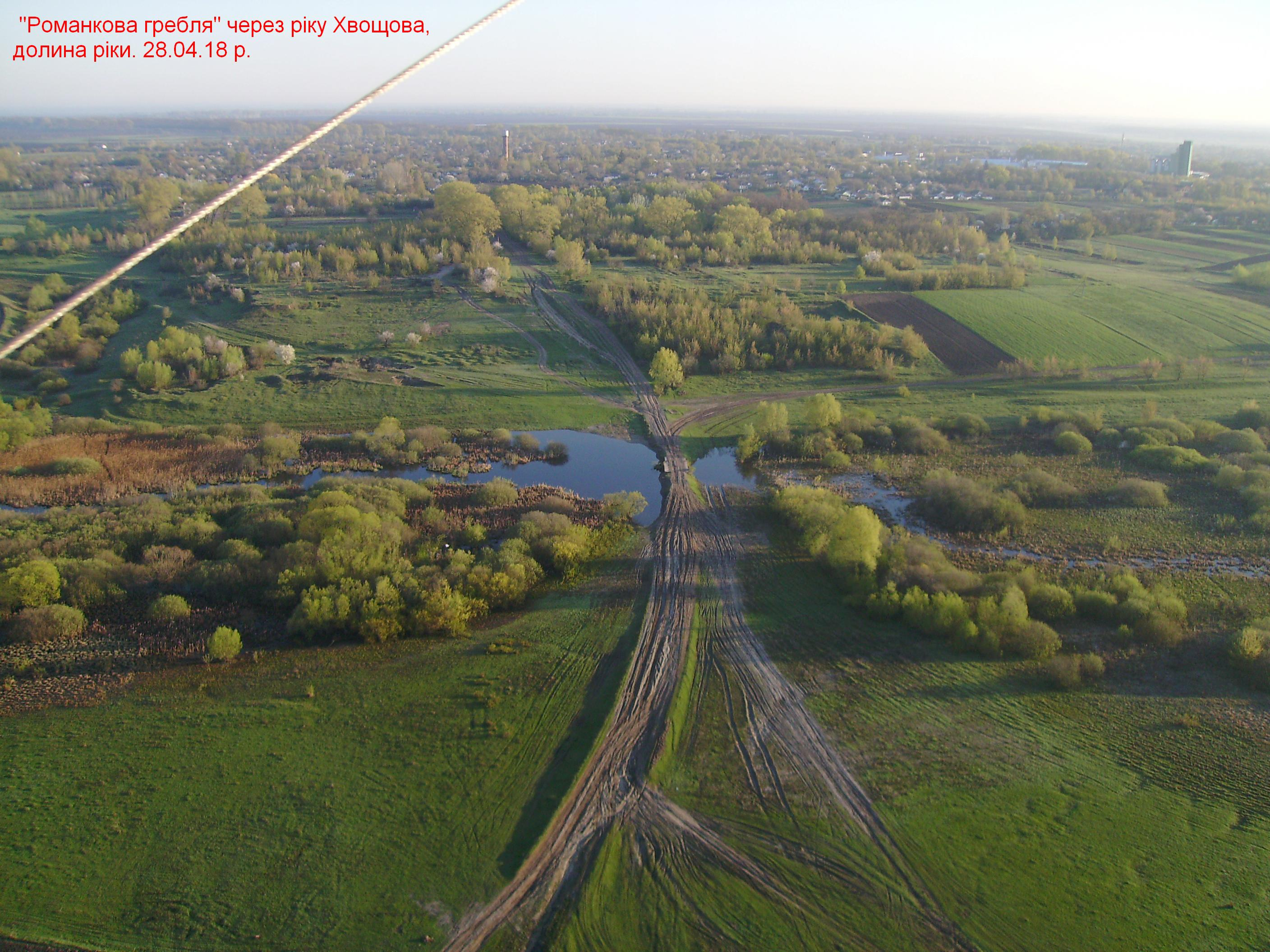 "РоманкОва гребля" - гребля на місці водяного млина на річці Хвощова.